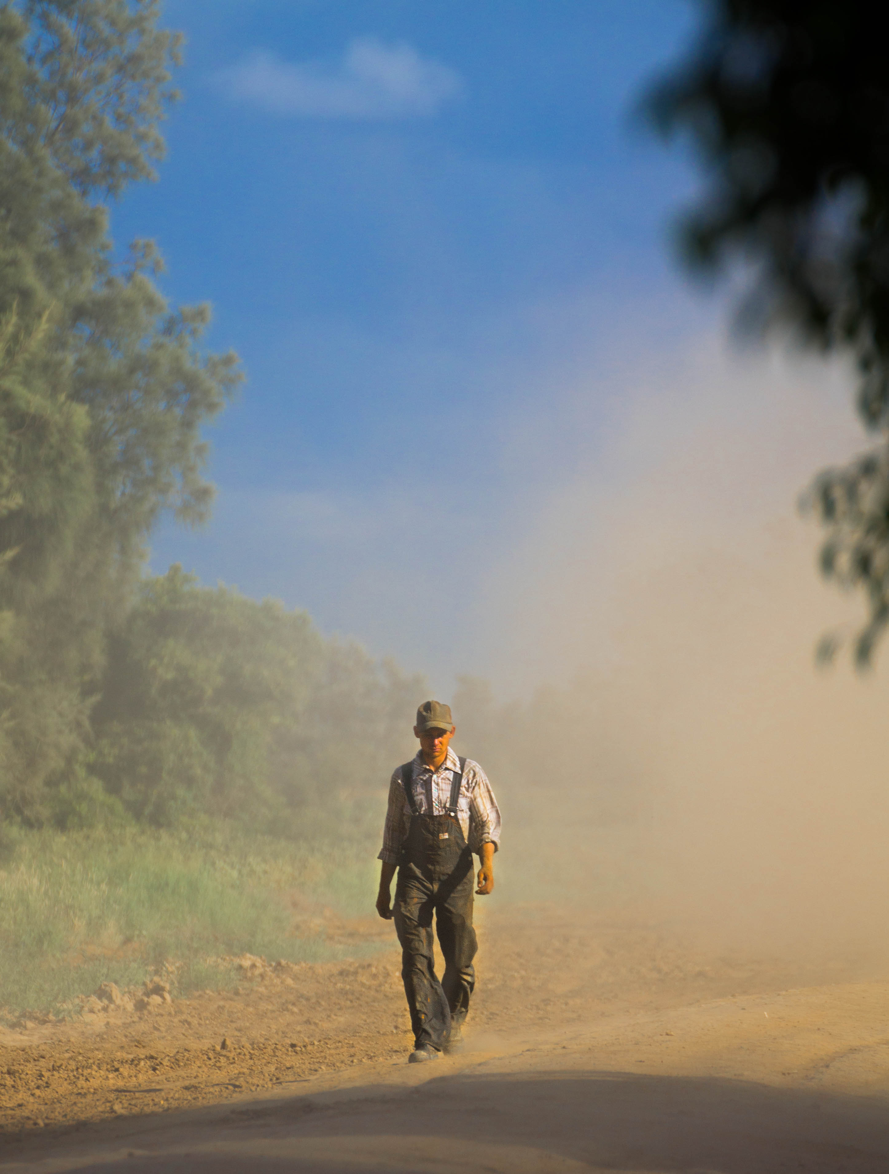 Ein Altkoloniermennonit in der "Colonia Del Norte", Bolivien